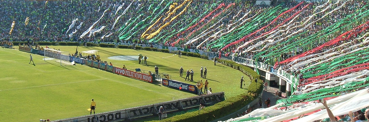 Torcida da Sociedade Esportiva Palmeiras no Estádio Palestra Itália